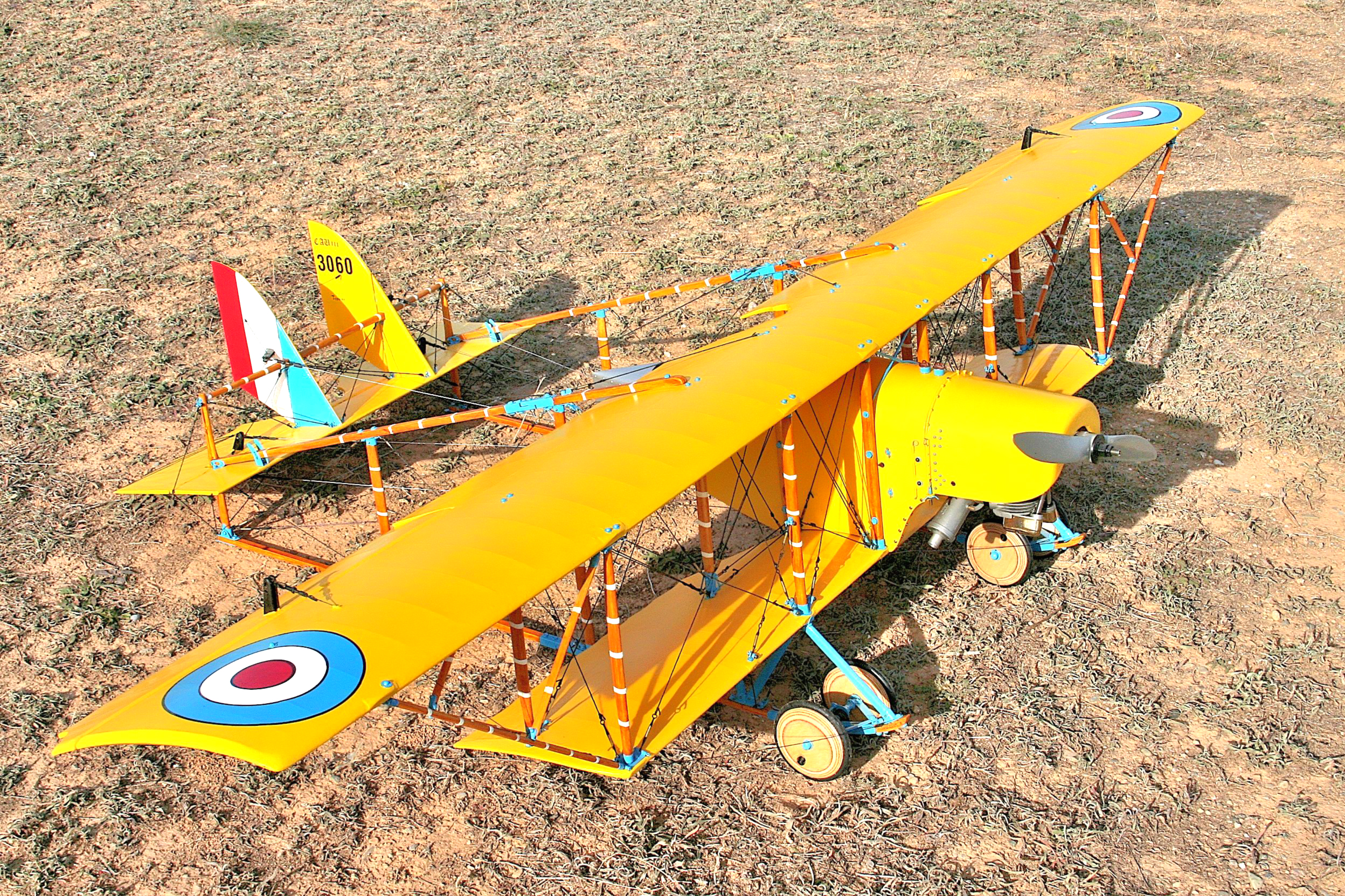 Aeromodelo a escala del Caudrón G3. Modelo teledirigido por radio-control.